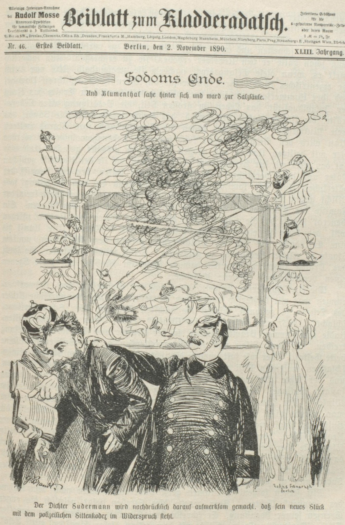 Gustav Brandt Karikatur in Kladderadatsch zu Hermann Sudermann Sodoms Ende 1890